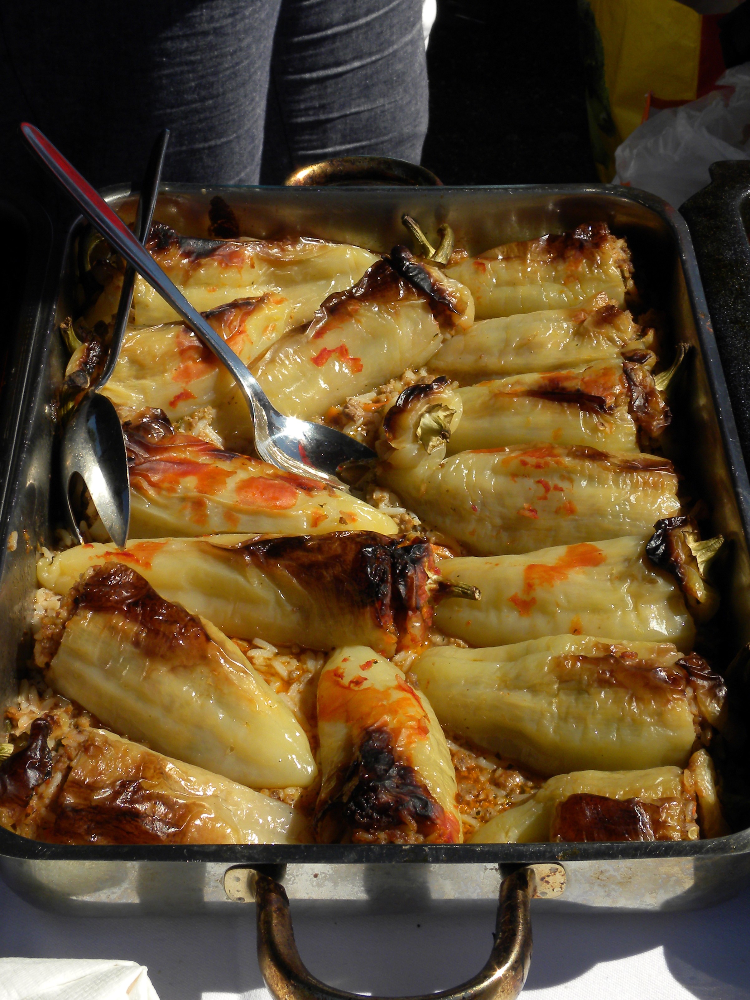 Spezialitäten aus der Makedonischen Küche - angeboten vom Makedonischen Folkloreverein "Makedonia" beim Wasserweltfest 2012 im Vogelweidpark in Wien Rudolfsheim-Fünfhaus